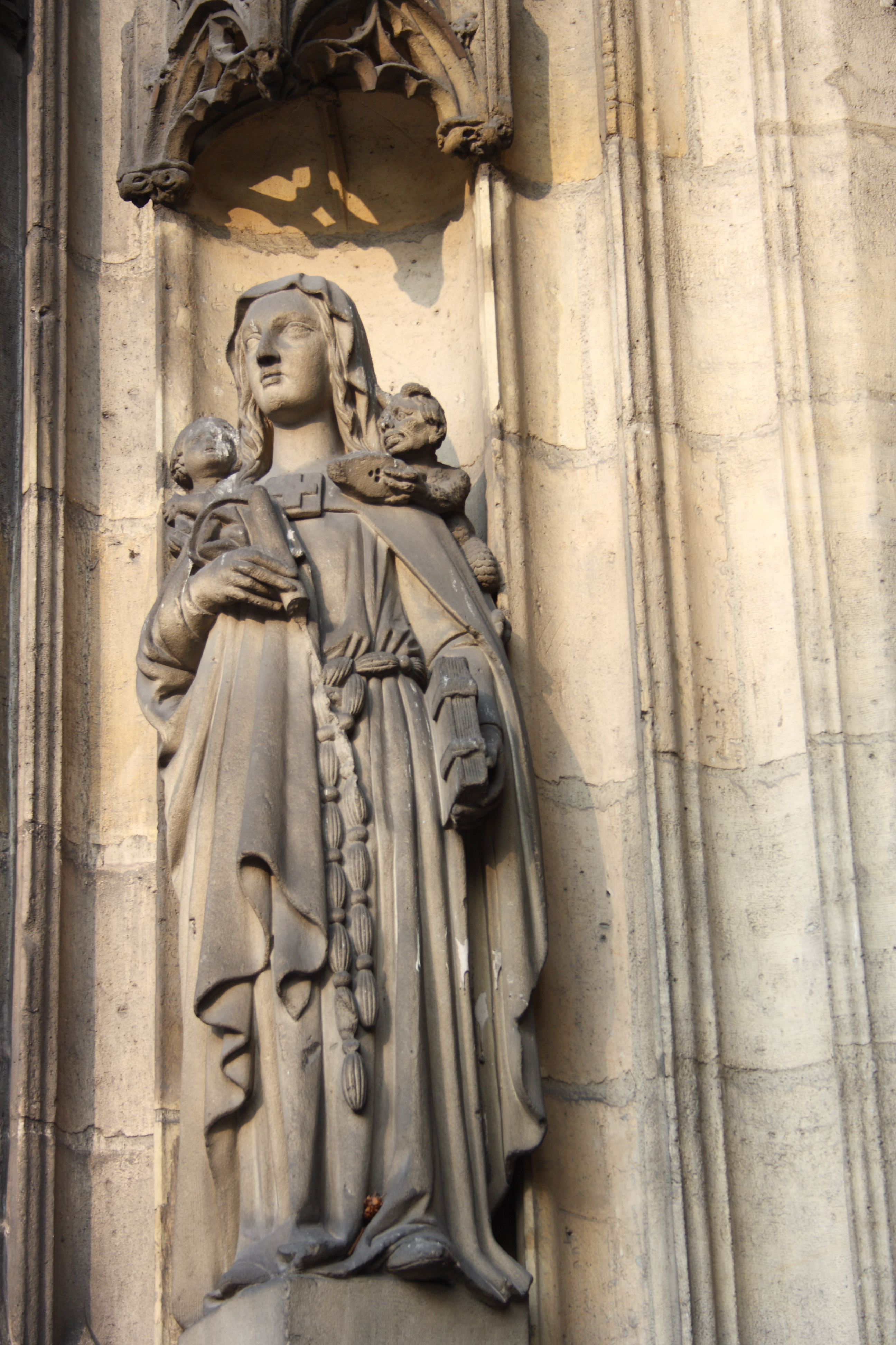 Statue an der Eingangsfassade der katholischen Pfarrkirche Saint-Nicolas-des-Champs in Paris